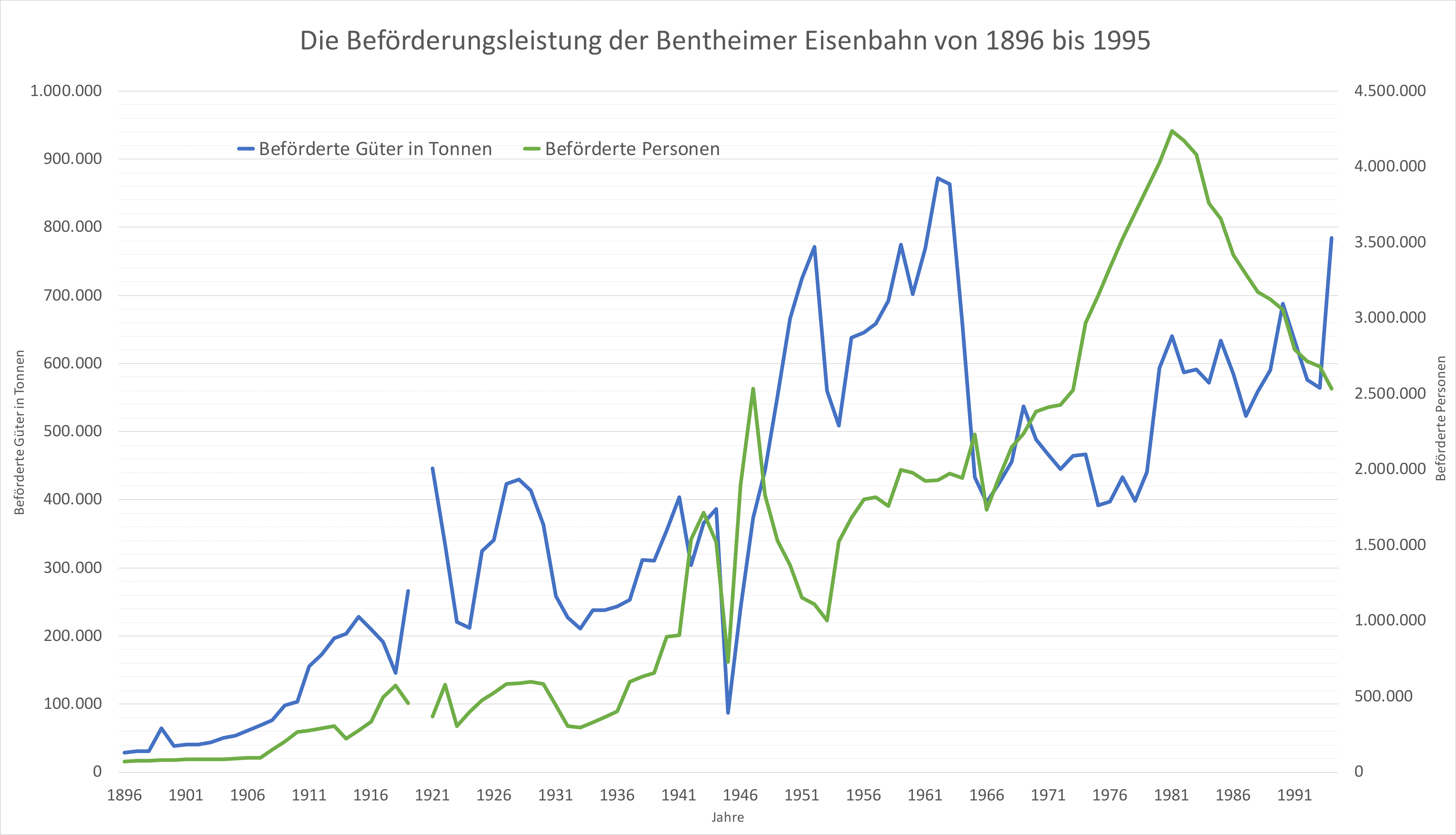 Diagramm zur Beförderungsleistung der Bentheimer Eisenbahn für den Gütertransport und Personenverkehr von 1896 bis 1995